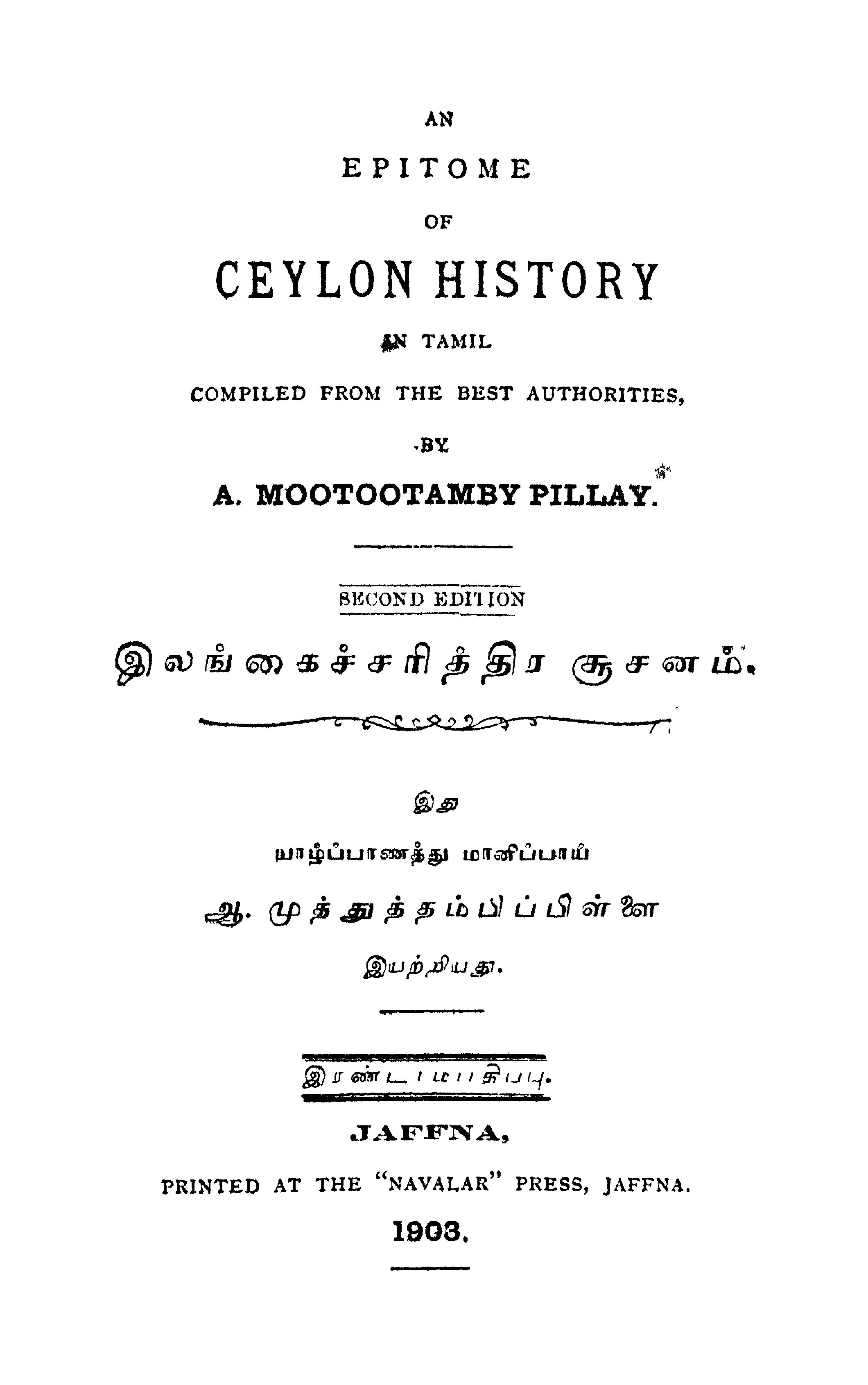 பகுப்பு:நூல் அட்டைகள்